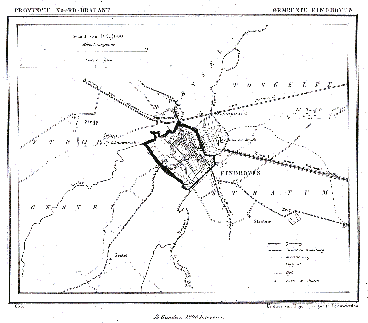 Nederland, Noord-Brabant, Gemeente Eindhoven